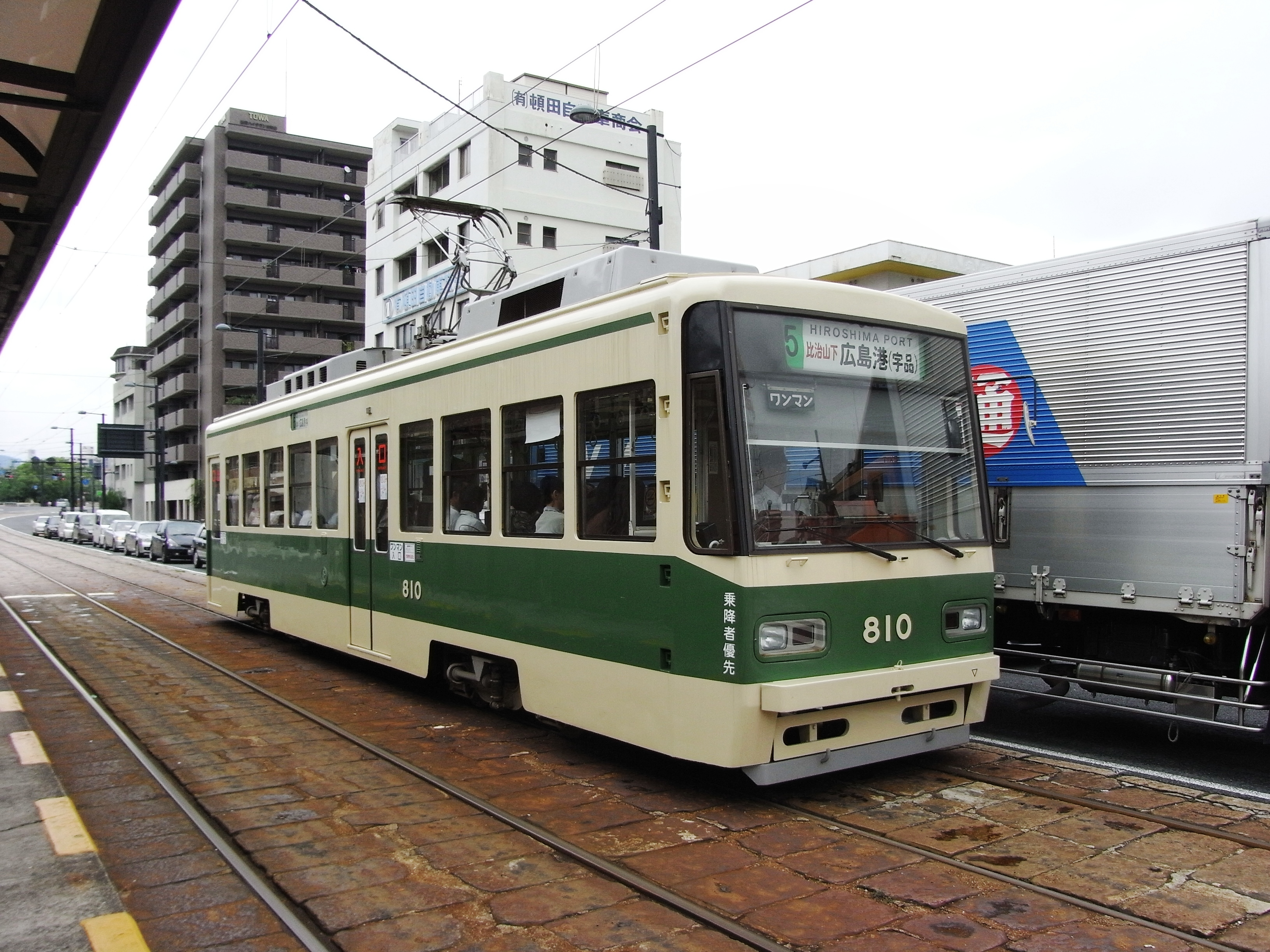 Hiroden Type800 Tram 810(広島電鉄800形電車 (2代)810)